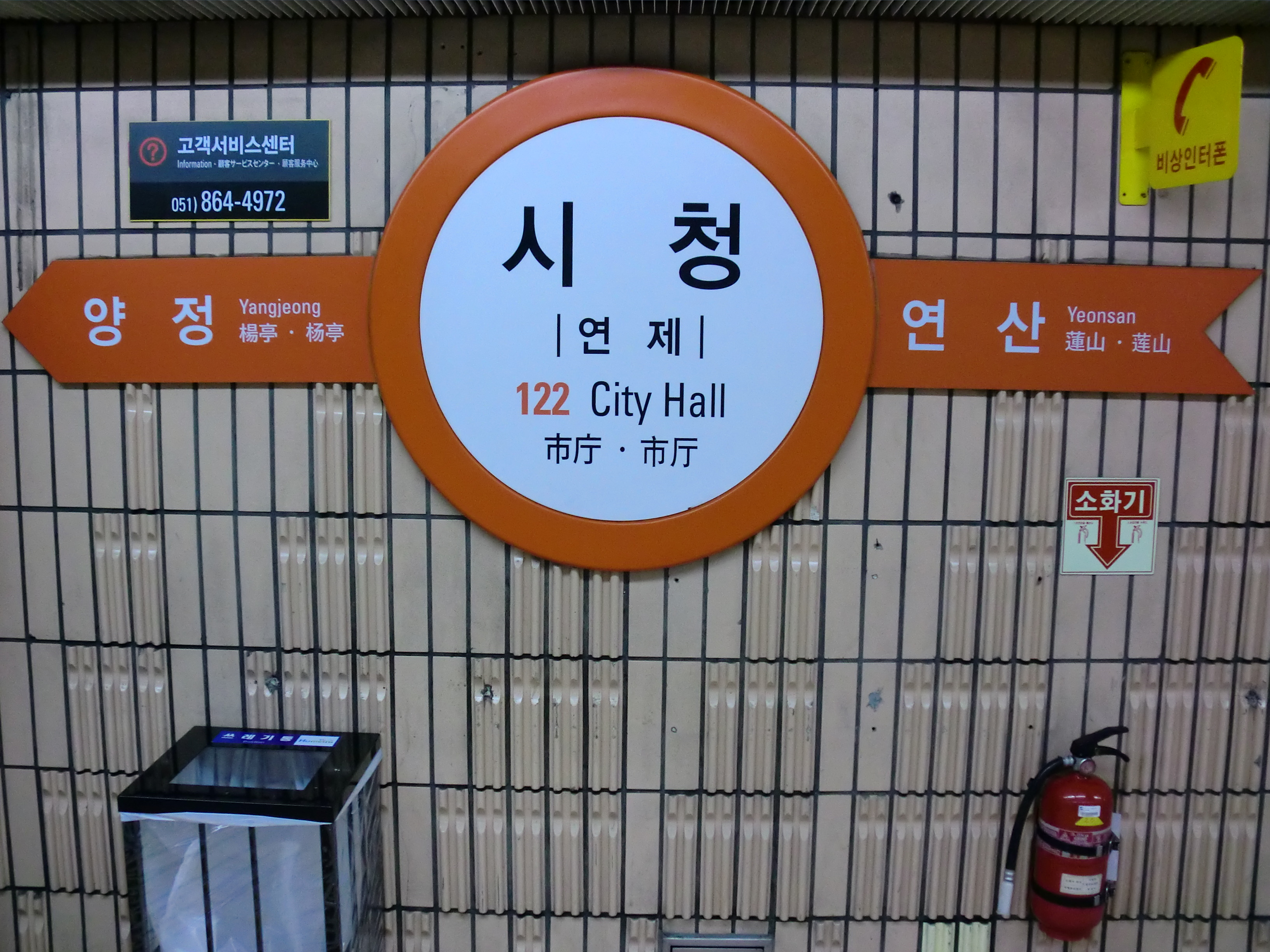 부산도시철도1호선 시청역의 역명판